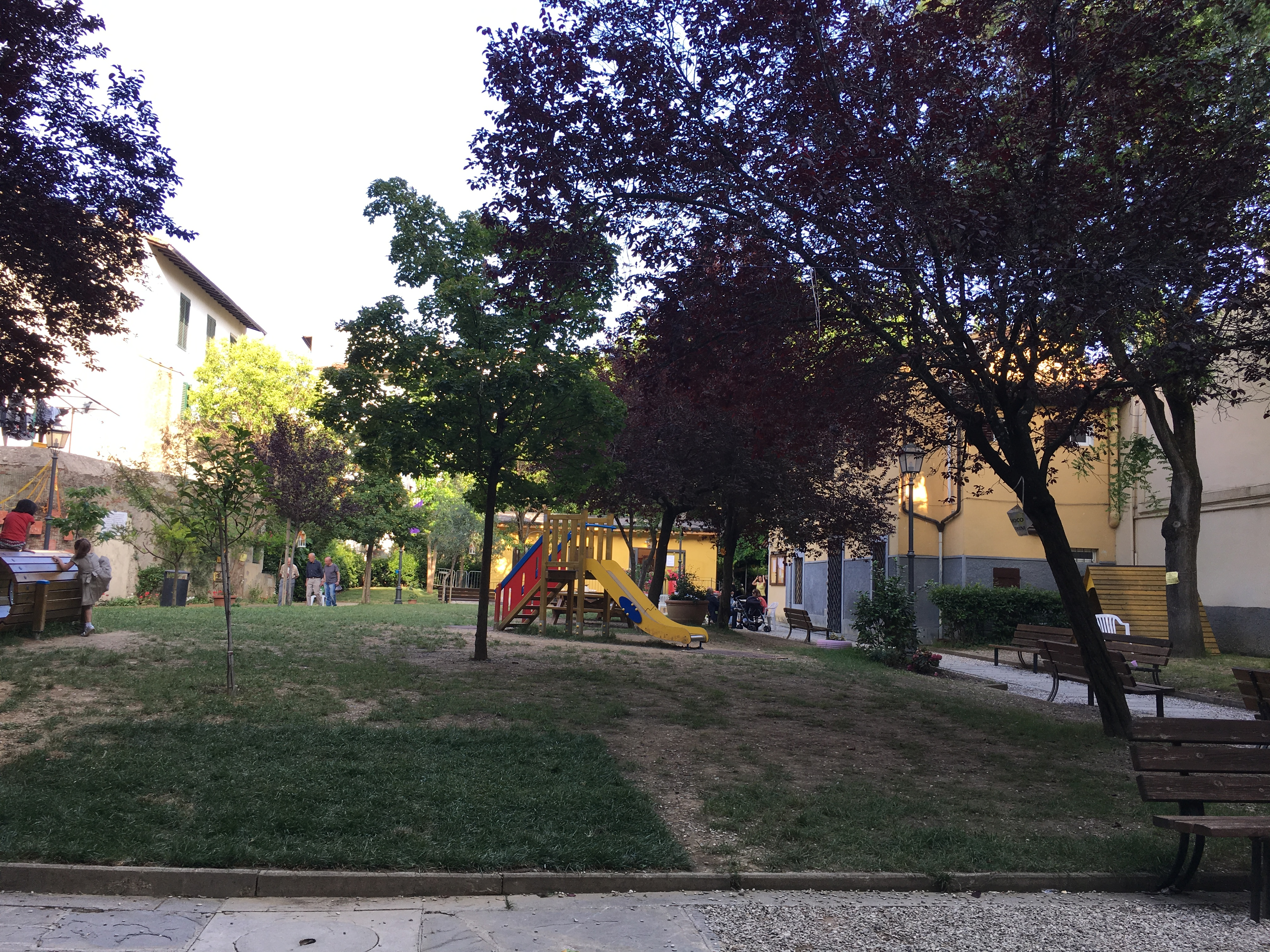 Giardino di Borgo Allegri Firenze